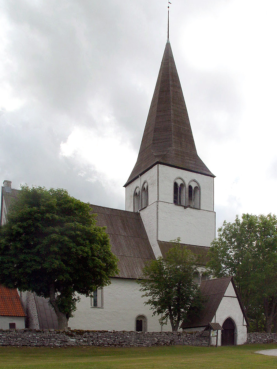 Rute Kirche (Gotland). Erbaut von 1235-1260